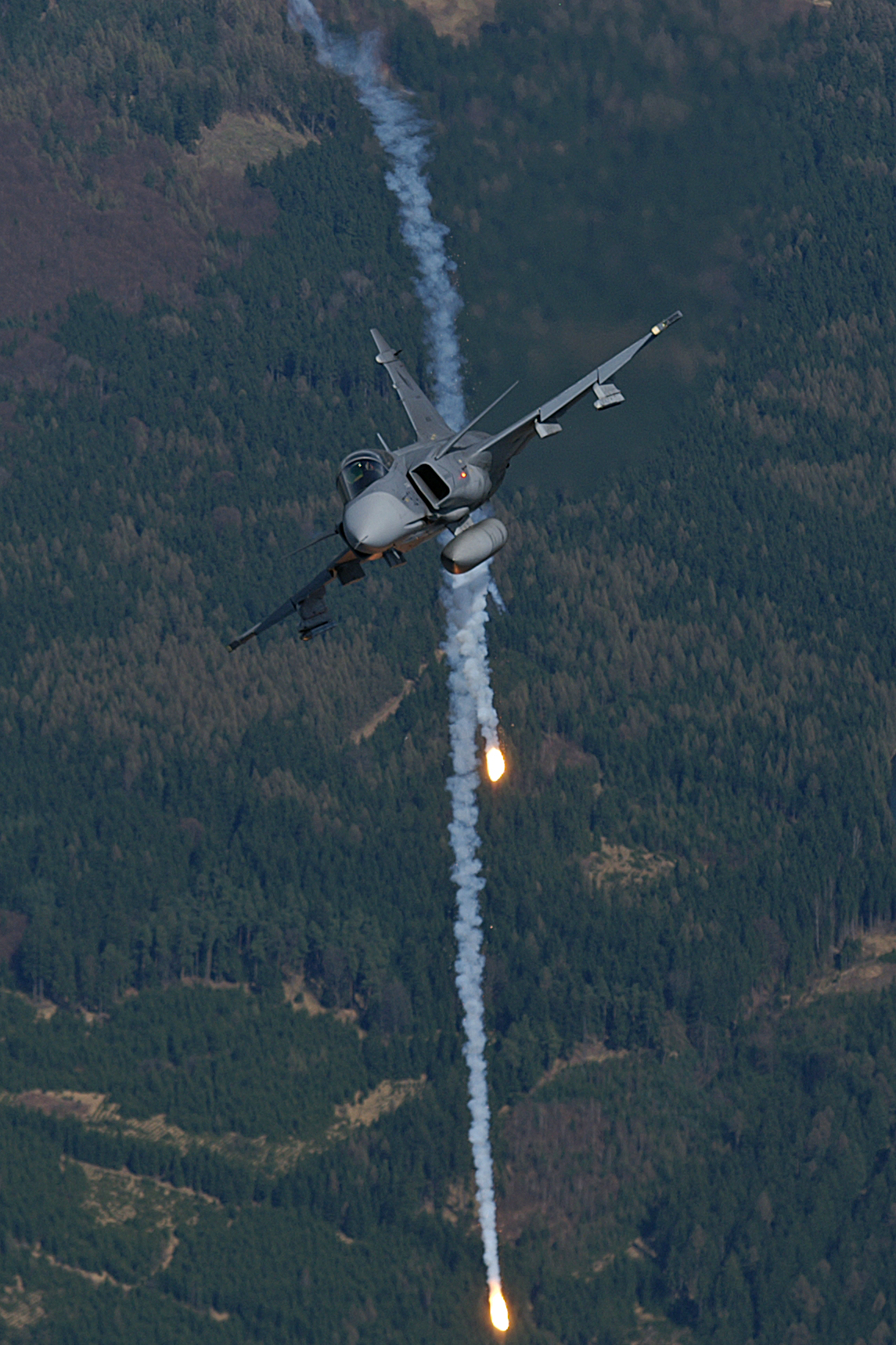 Flares